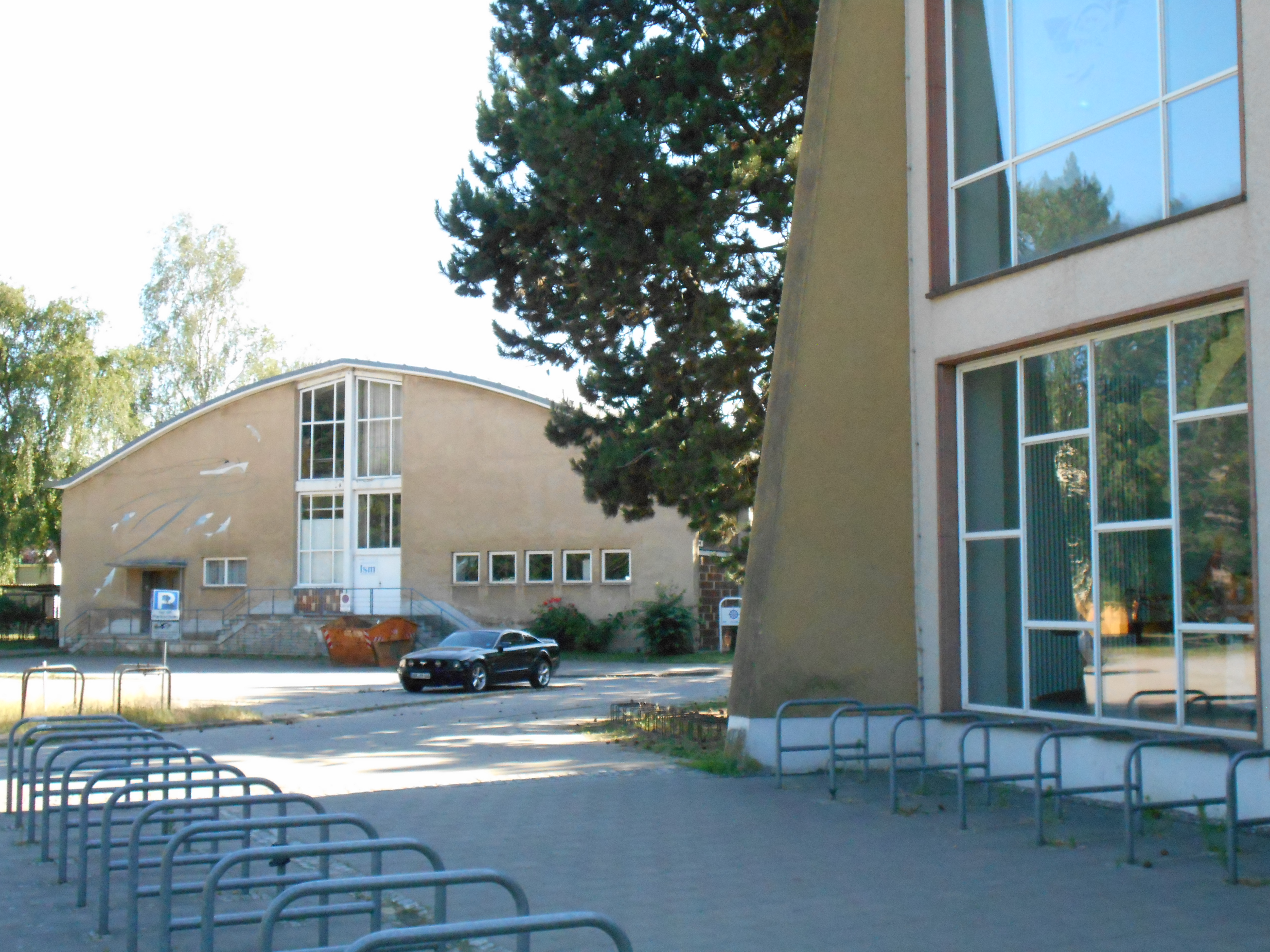 Großer Hörsaal und Strömungshalle der Schiffbautechnischen Fakultät Rostock